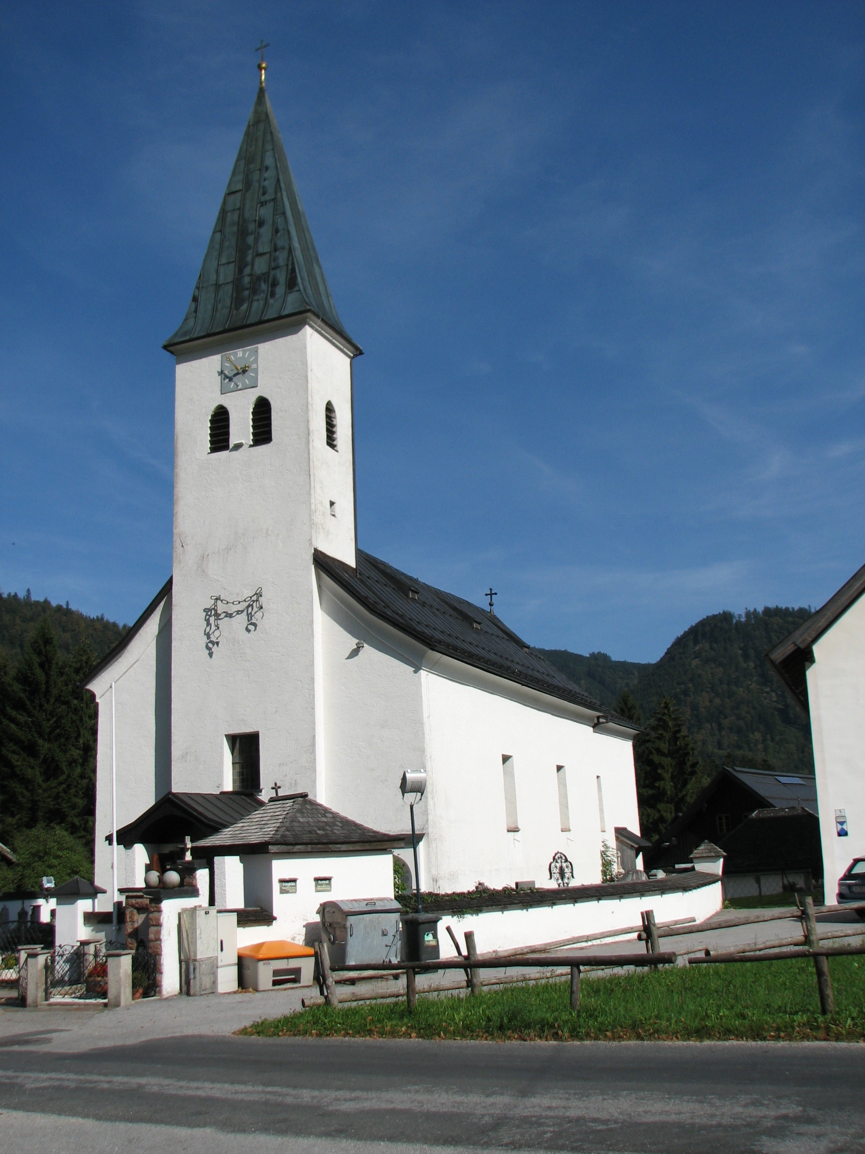 Kath. Pfarrkirche hll. Leonhard und Georg